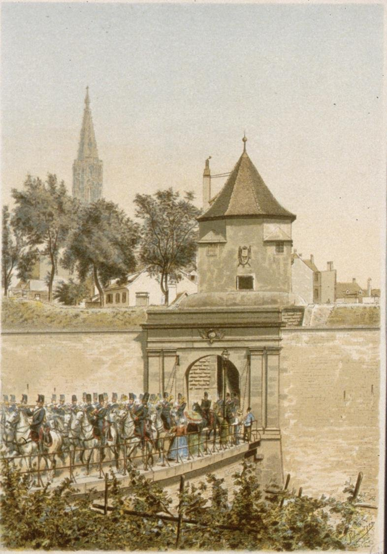 Illustration de la porte d’Austerlitz vers 1860.